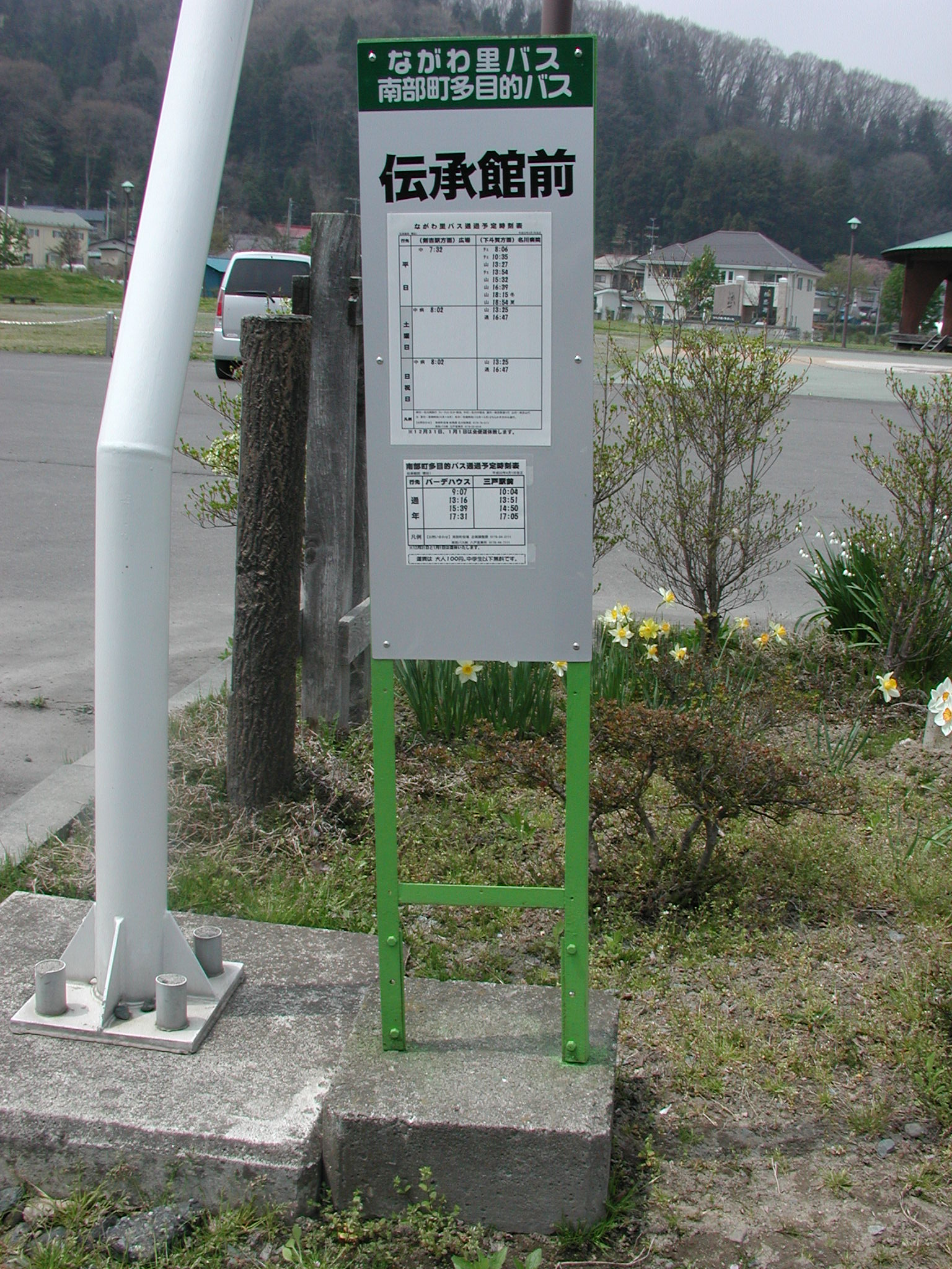 『伝承館前』バス停留所ポール（南部町剣吉地区：ながわ里バス/南部町多目的バス共用）